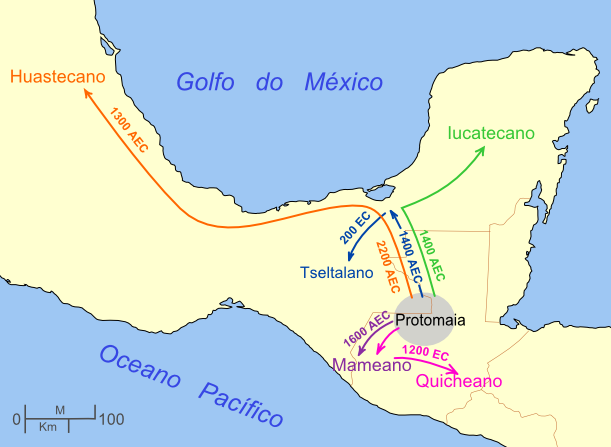 Mapa da migração das línguas maias